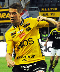 Marcus Rohdén